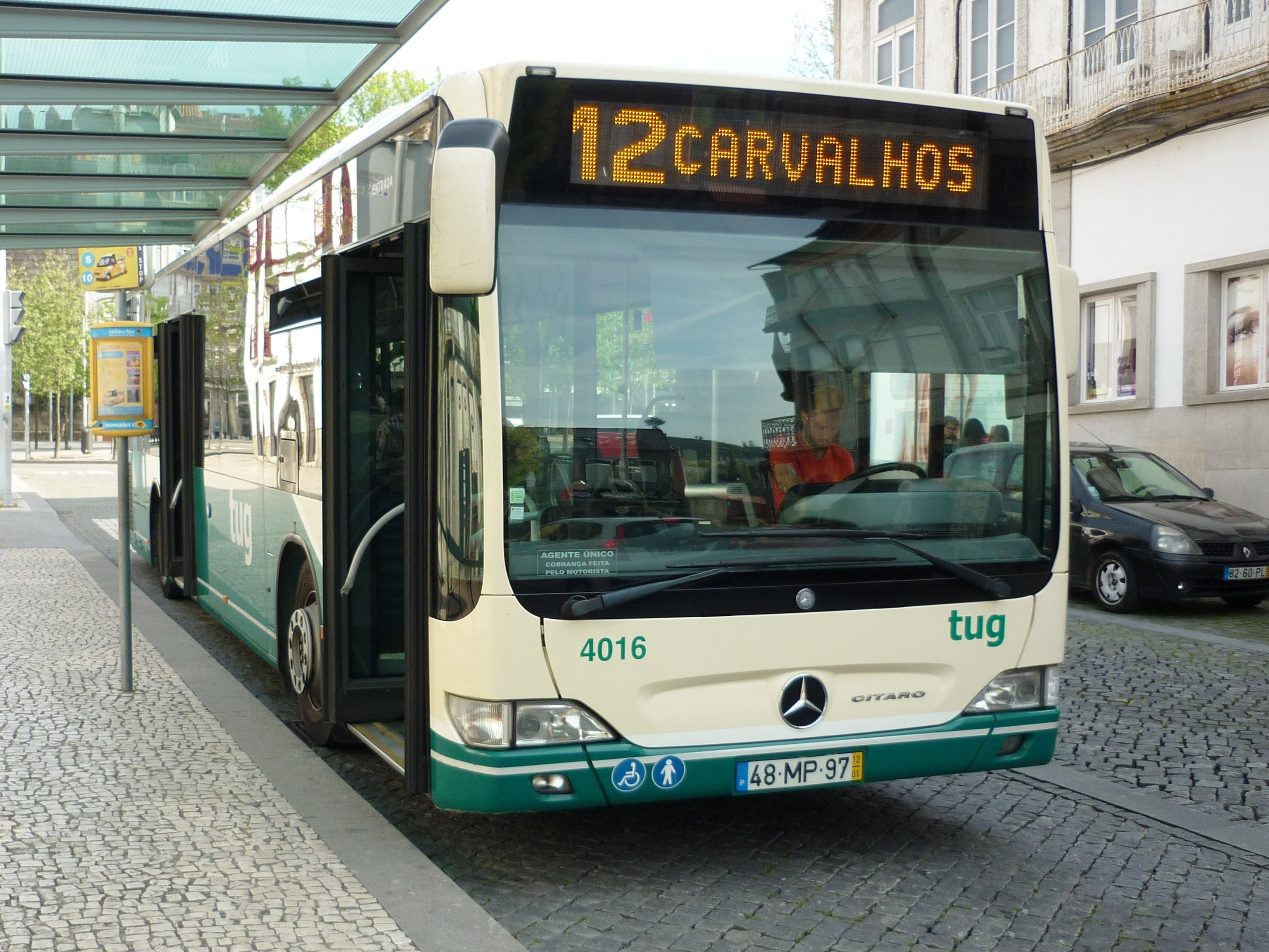 4016_TUG